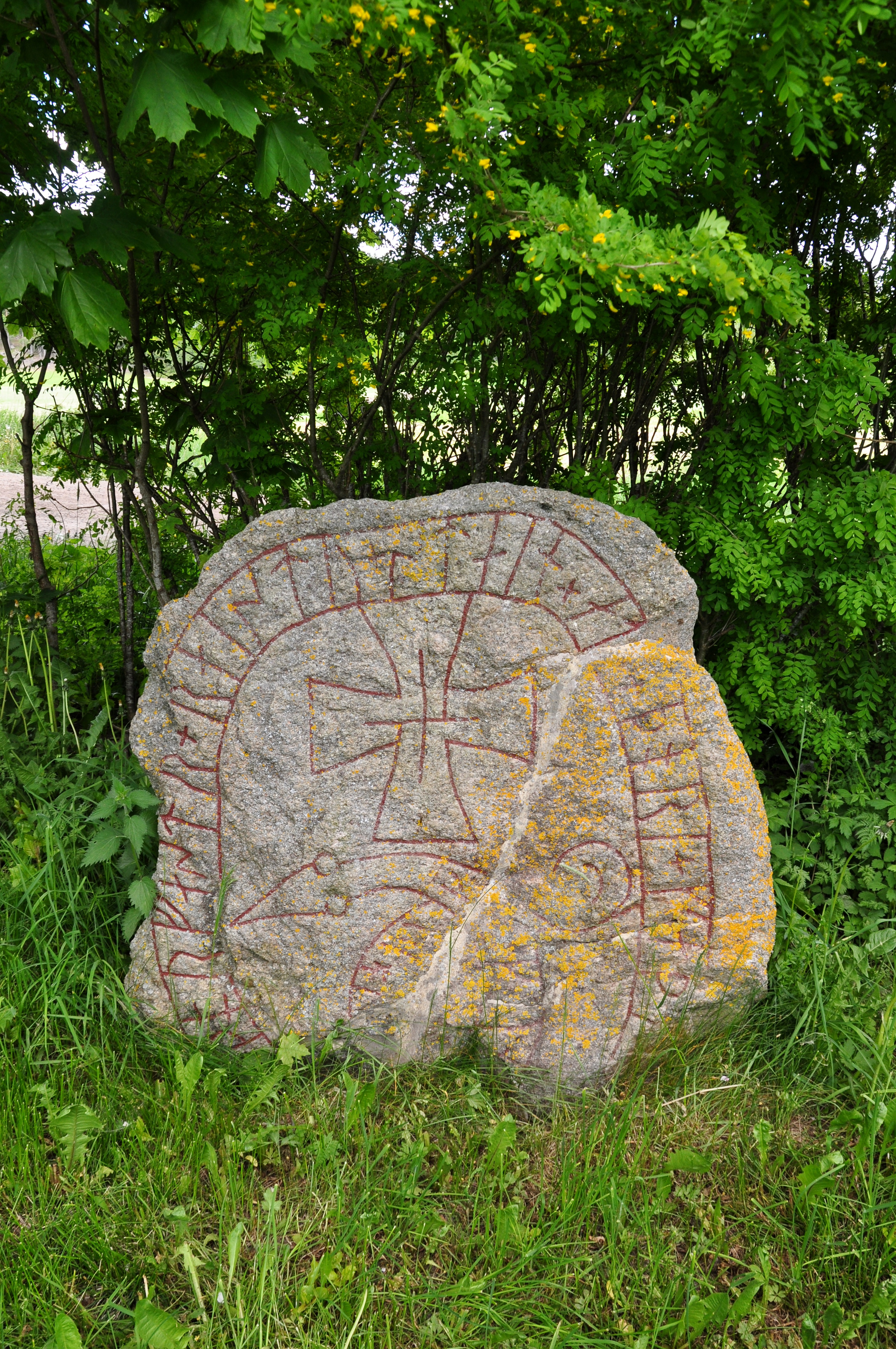 Runsten Sö 233 i Trollsta, Sorunda socken, Södermanland.